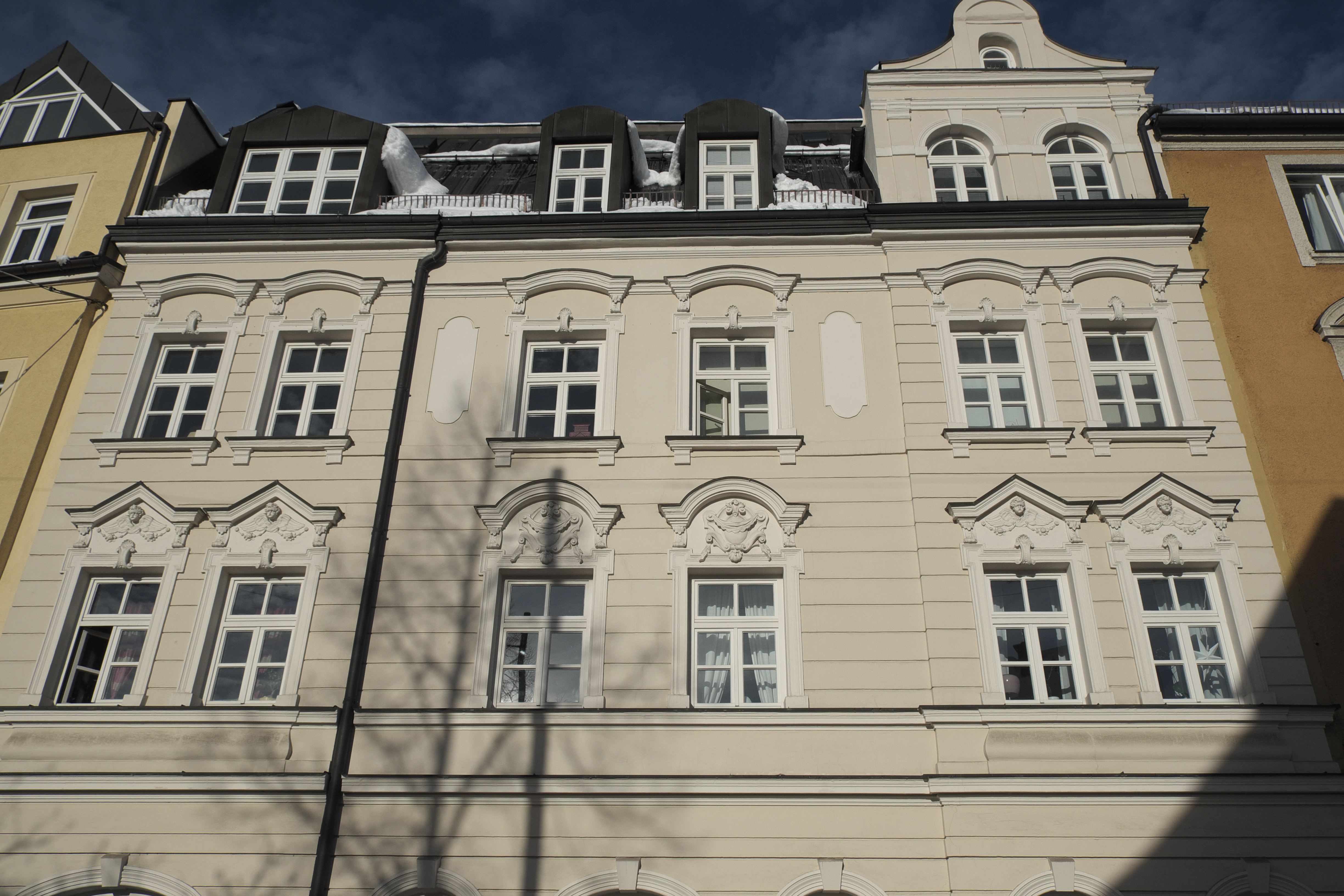 Mietshaus in der Wolfgangstraße 5 in Haidhausen im Stadtbezirk Au-Haidhausen in München (Bayern/Deutschland), um 1890, mit reichem Stuckdekor